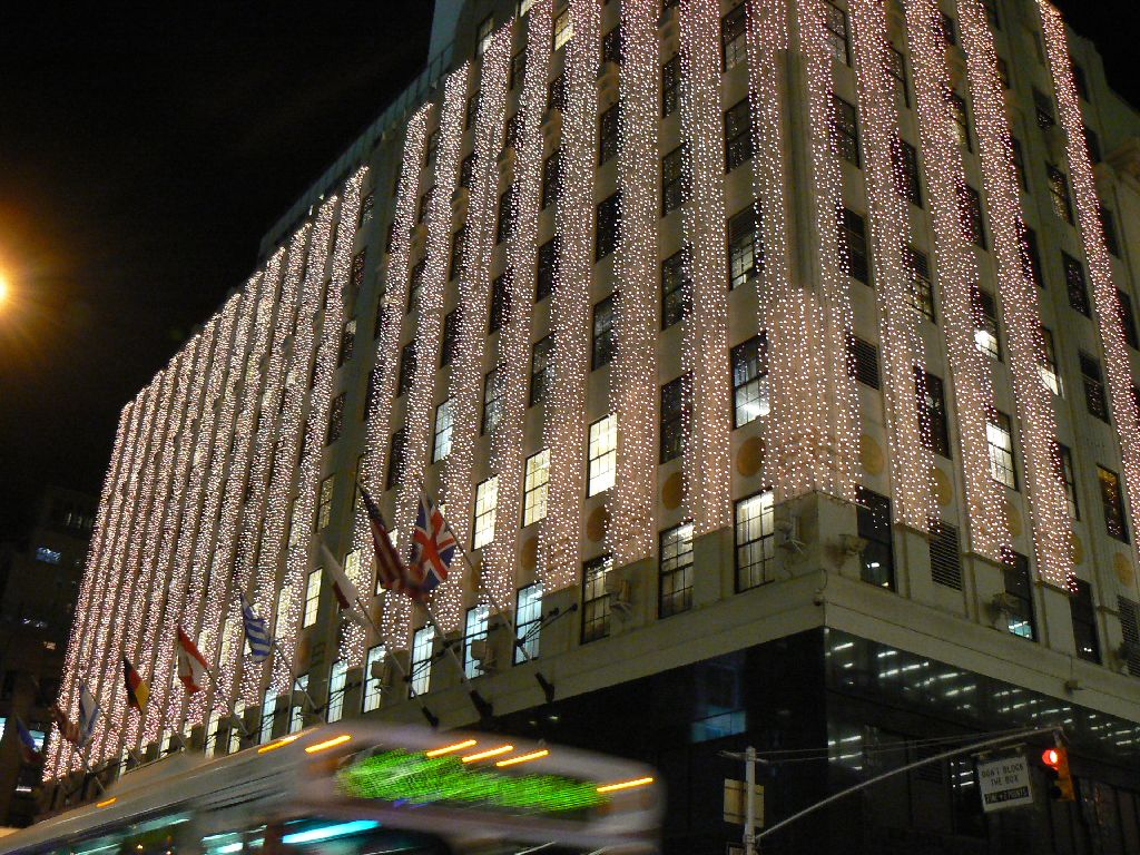 Stammhaus Bloomingdale's in New York City mit Weihnachtsbeleuchtung